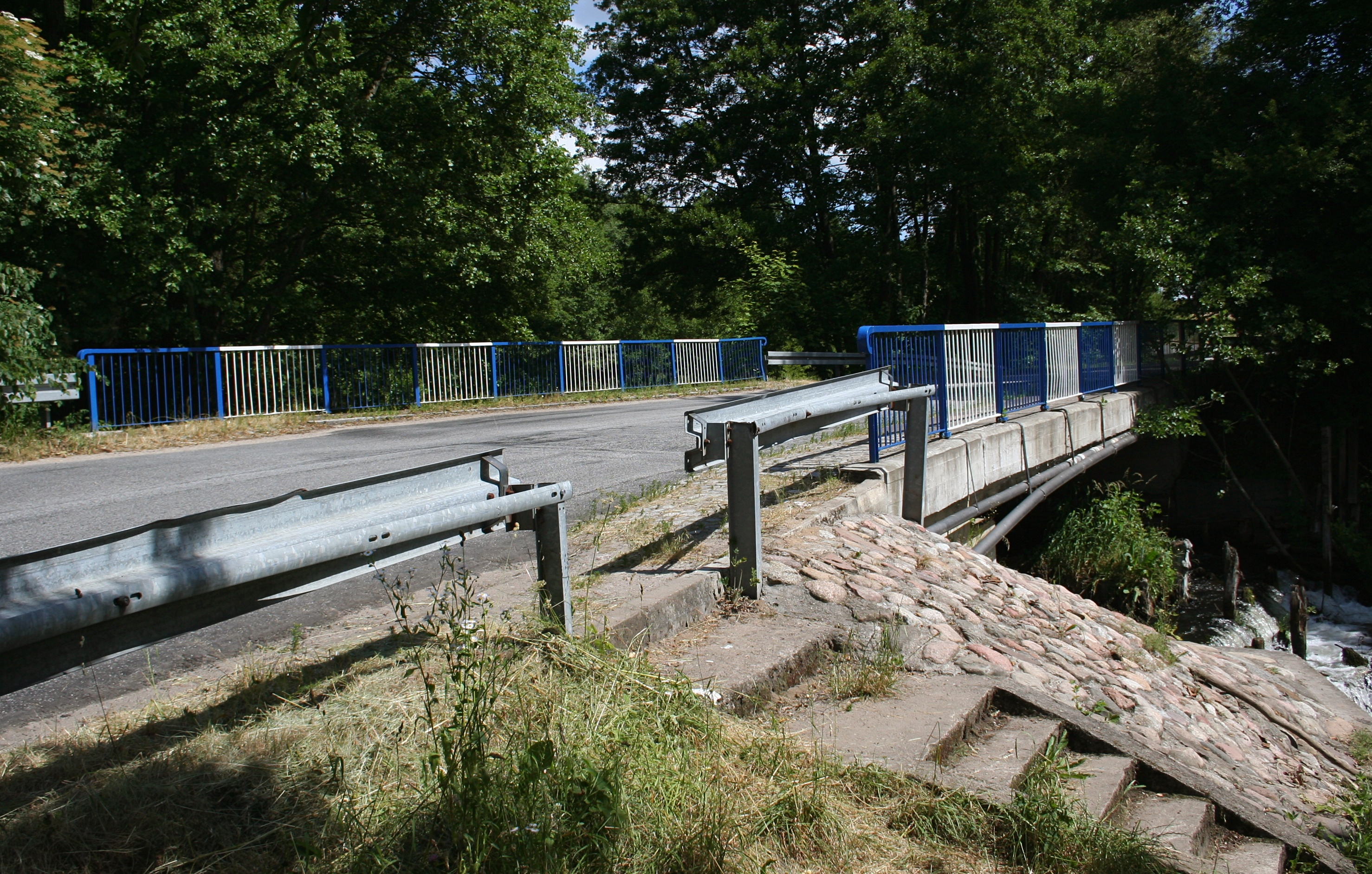 Chociński Młyn - most nad Chociną - DW 236